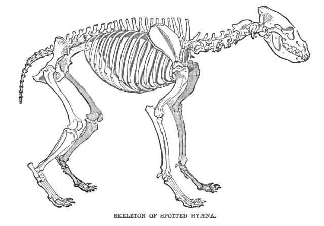 Spotted Hyaena (Crocuta crocuta) skeleton